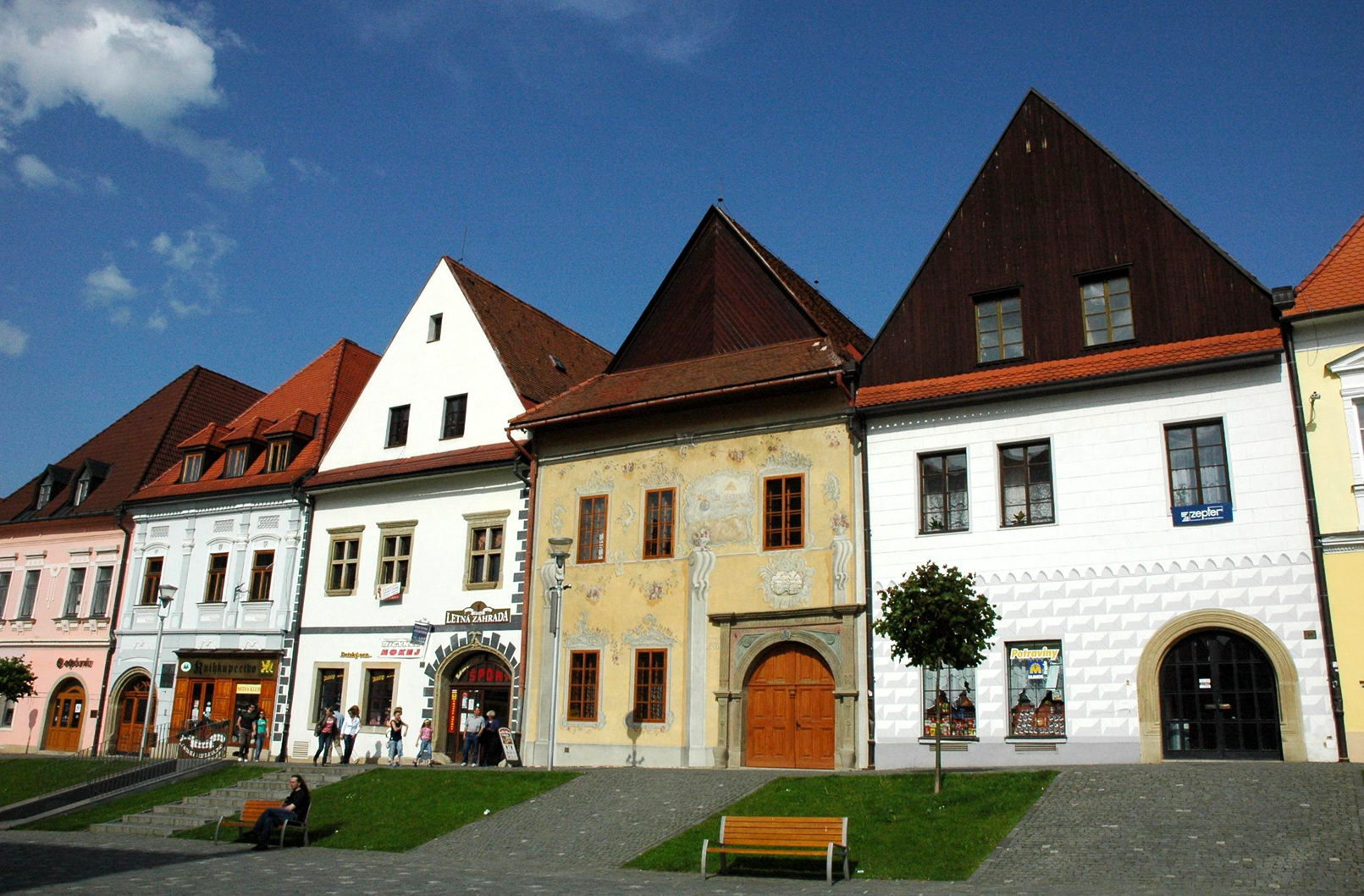 Bardejov, Radničné námestie